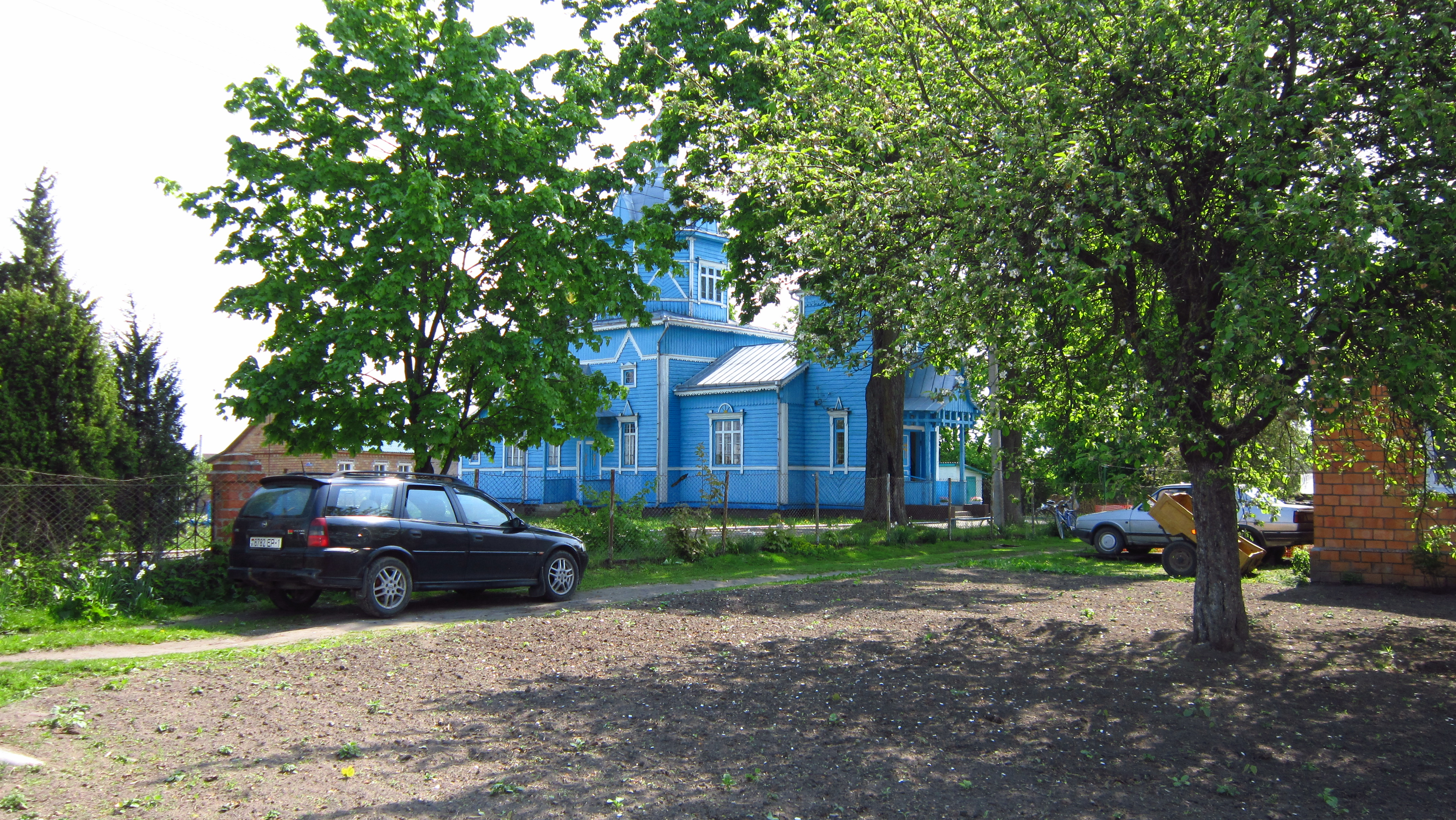 Церковь Святой Троицы